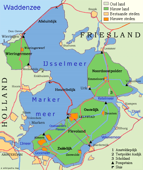 Zuiderzeewerken.png vertaald in het Nederlands